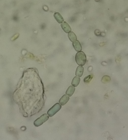 Anabaena azollae mit Heterocyste aus Azolla spec.